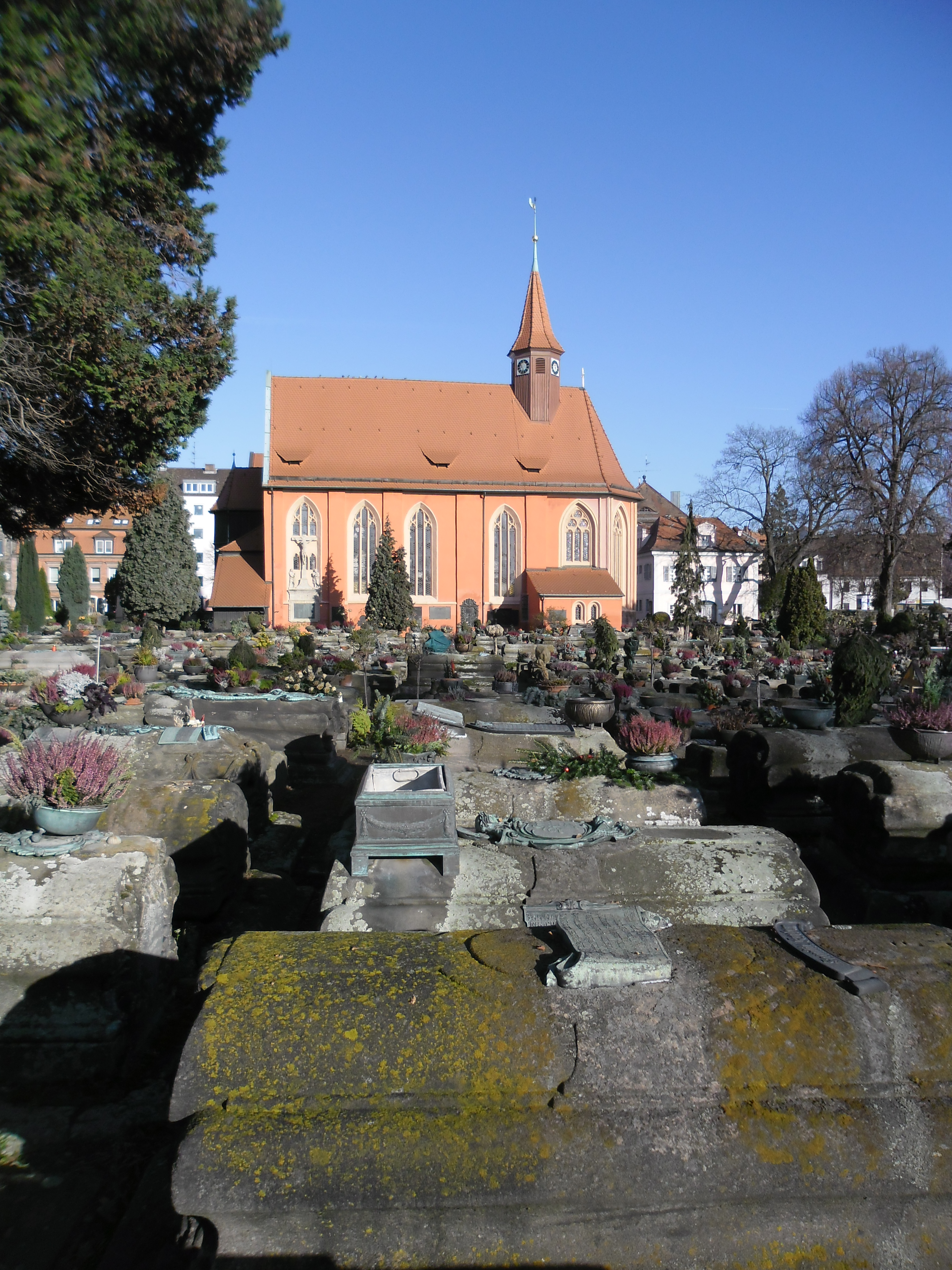 Siehe Bildtitel